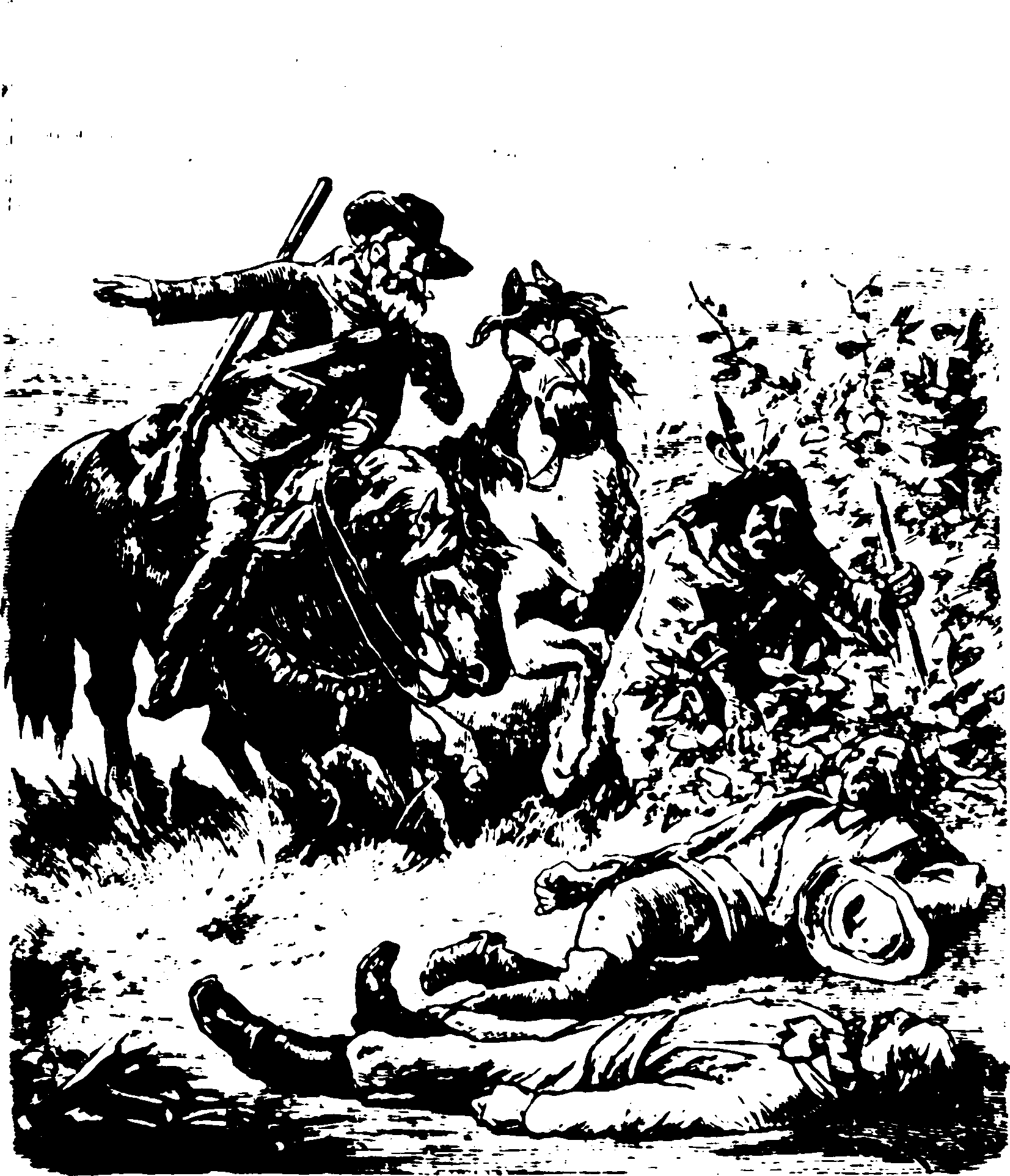 Blizzard